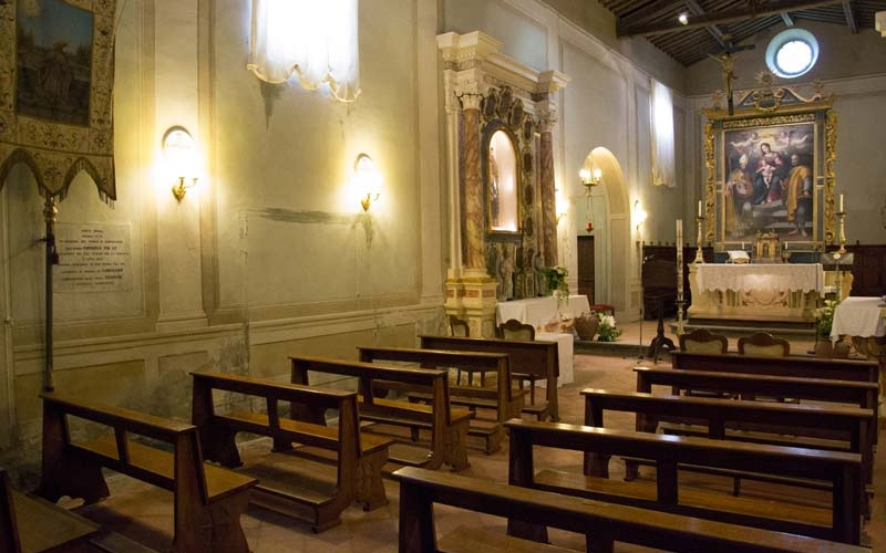 Chiesa